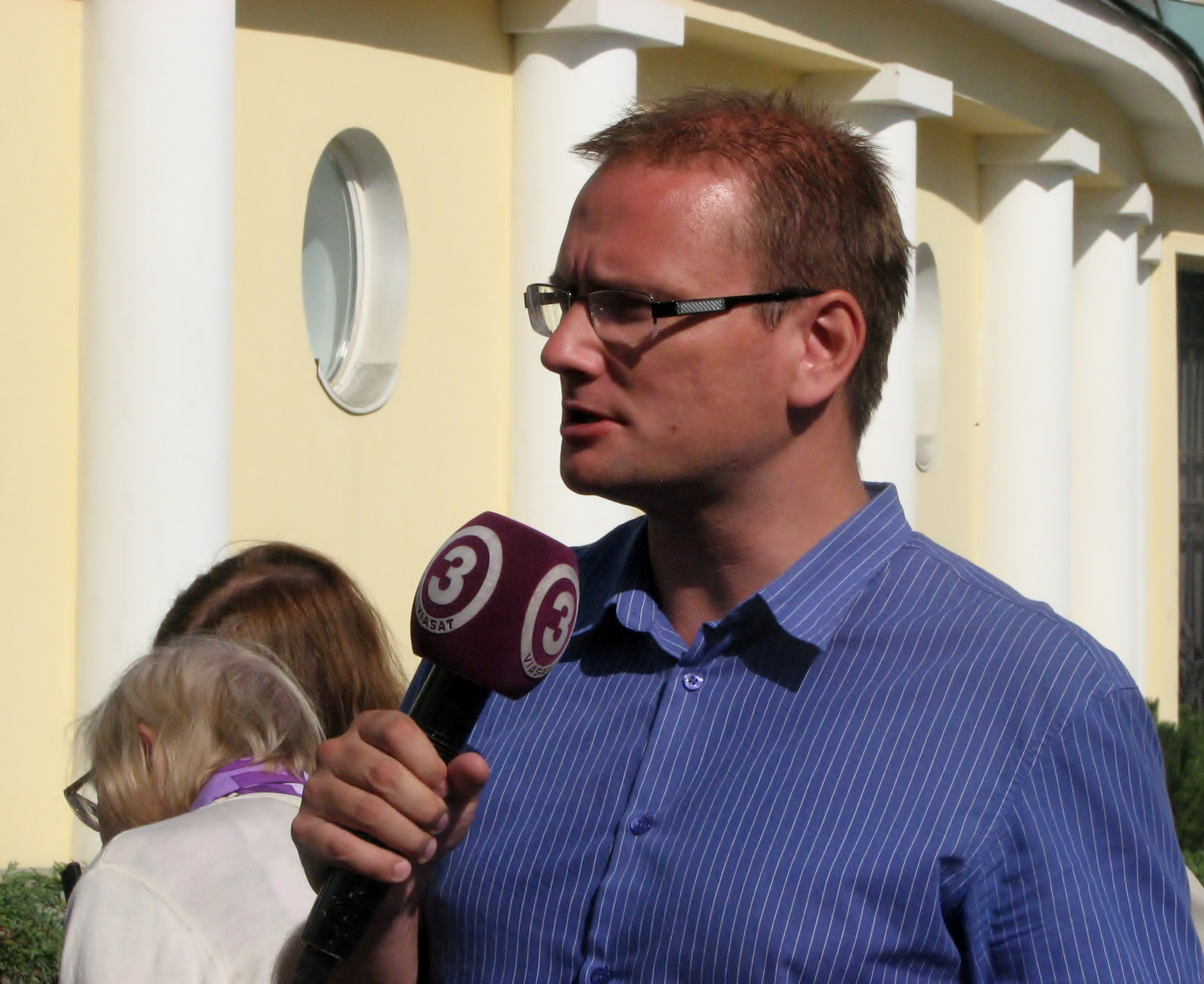 Sven Soiver Estonia maja juubelipidustustel reprtaaži tegemas